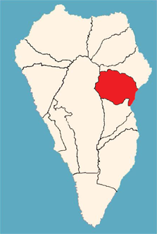 Ubicación de Santa Cruz de La Palma